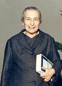 Fotografia della filosofa italiana Sofia Vanni Rovighi.